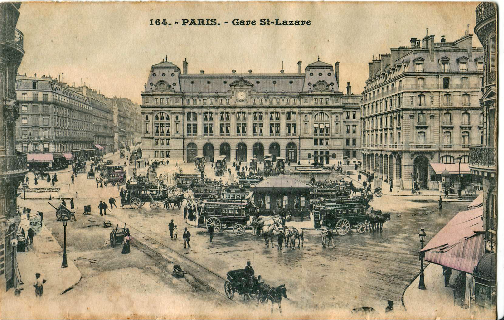 Carte postale ancienne sans mention d'éditeur, n°164 : PARIS - Gare Saint-Lazare